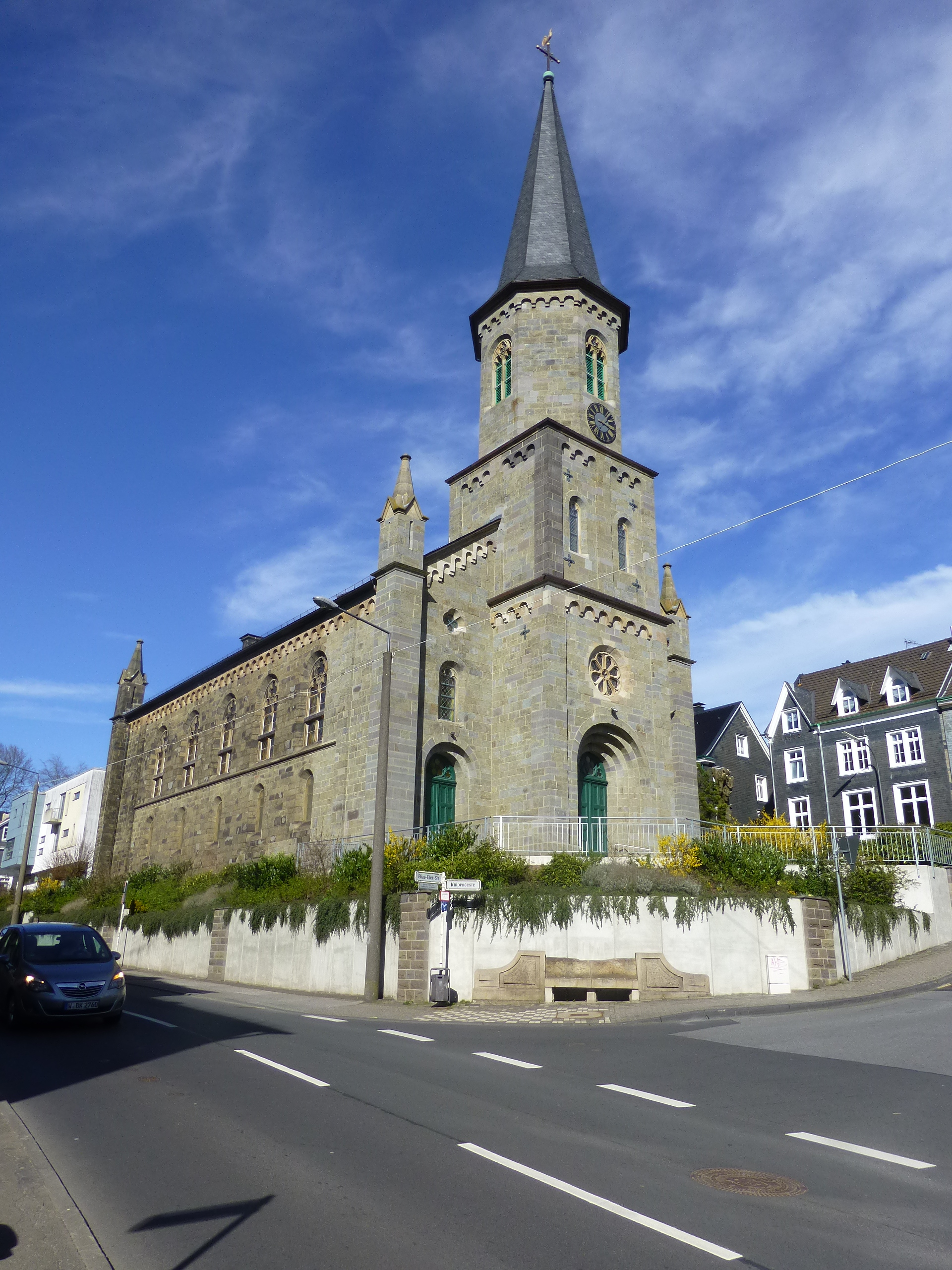 Elias-Eller-Straße, Wuppertal